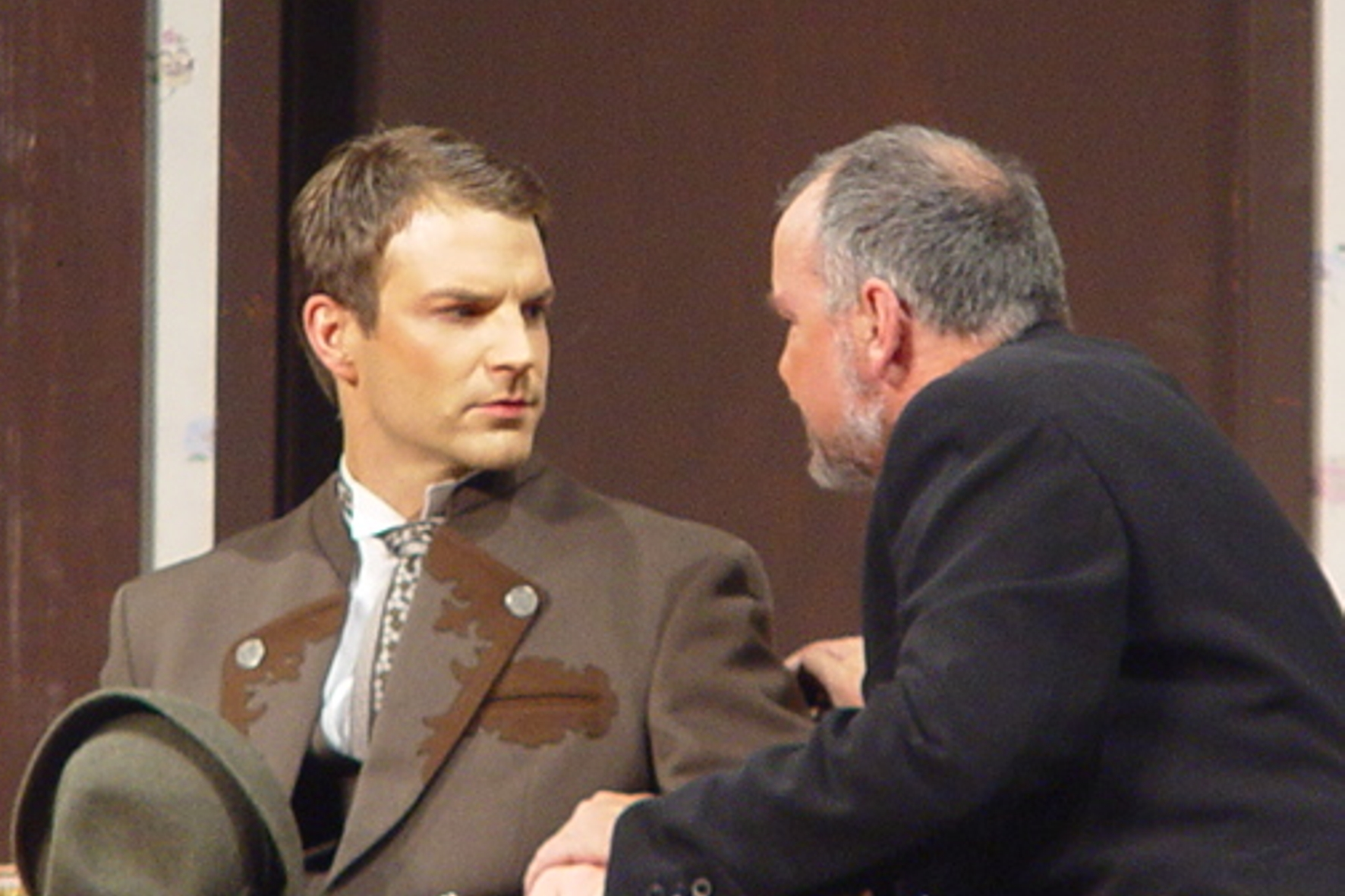 Schauspieler Norman Kalle zusammen mit Jürgen Link-Hessing in dem Comedy Der kühne Schwimmer von Franz Arnold und Ernst Bach, Mund Art Theater